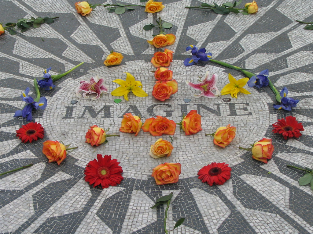 La plaque Imagine sur Strawberry Fields, à New York, en hommage à John Lennon. Photographie par Ramy Majouji.